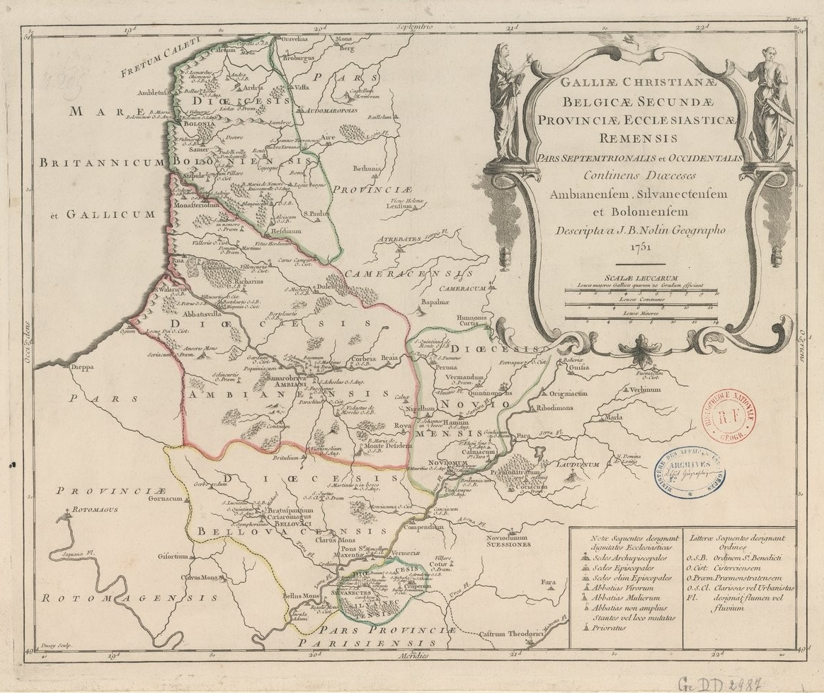 Carte de l'ancienne province ecclésiastique de Reims nord-ouest, insérée dans la Gallia Christiana (1715/1759).